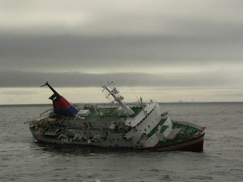 Untergang der MS Explorer und Rettungsaktion der MS Nordnorge am 23.11.2007 im Bransfield Strait